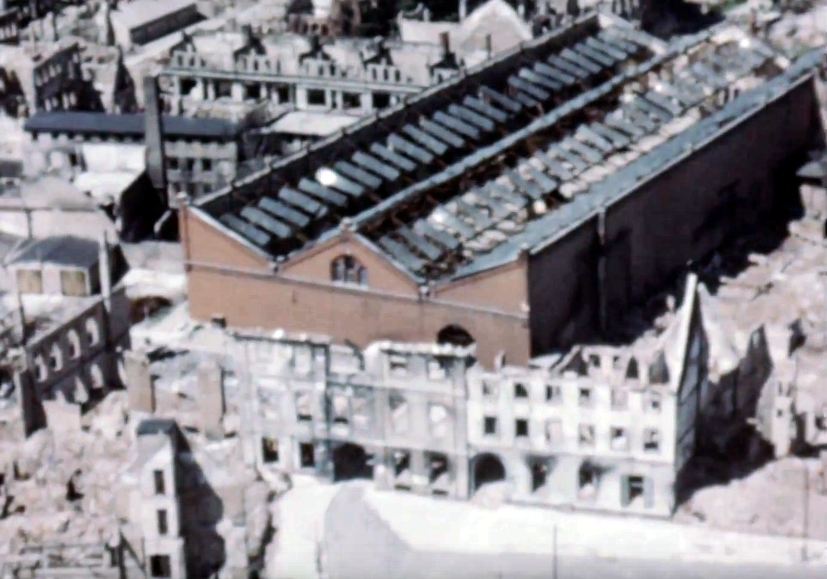 Die Braunschweiger Markthalle im Juni 1945 in einem Ausschnitt einer US-amerikanischen Luftbildaufnahme.